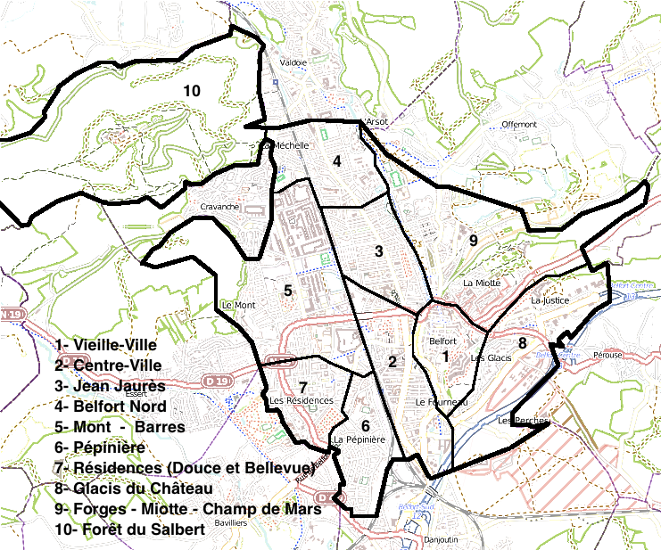 Belfort et ses 10 quartiers This map may be incomplete, and may contain errors. Don't rely solely on it for navigation.